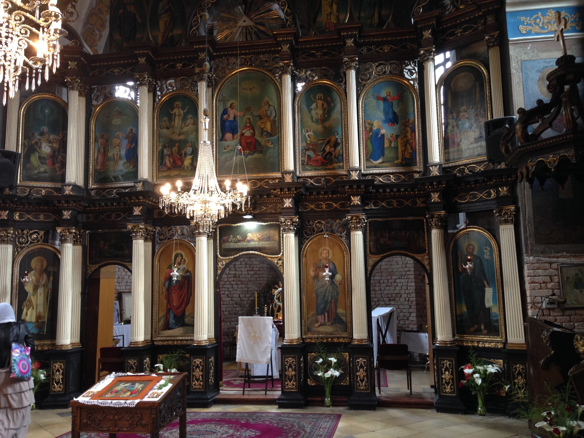 Srpski (latinica): Deo oltara hrama Sv. Trojice u Zemunu, Serbia